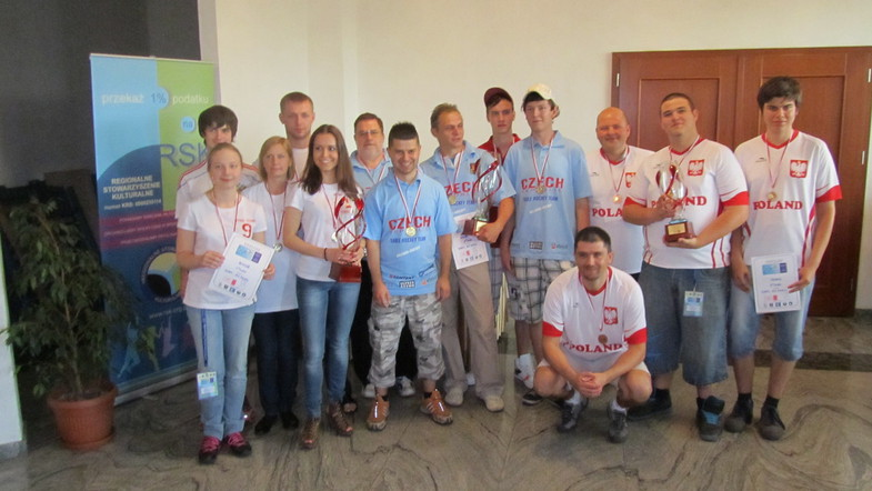 команды России , Чехии и Польши